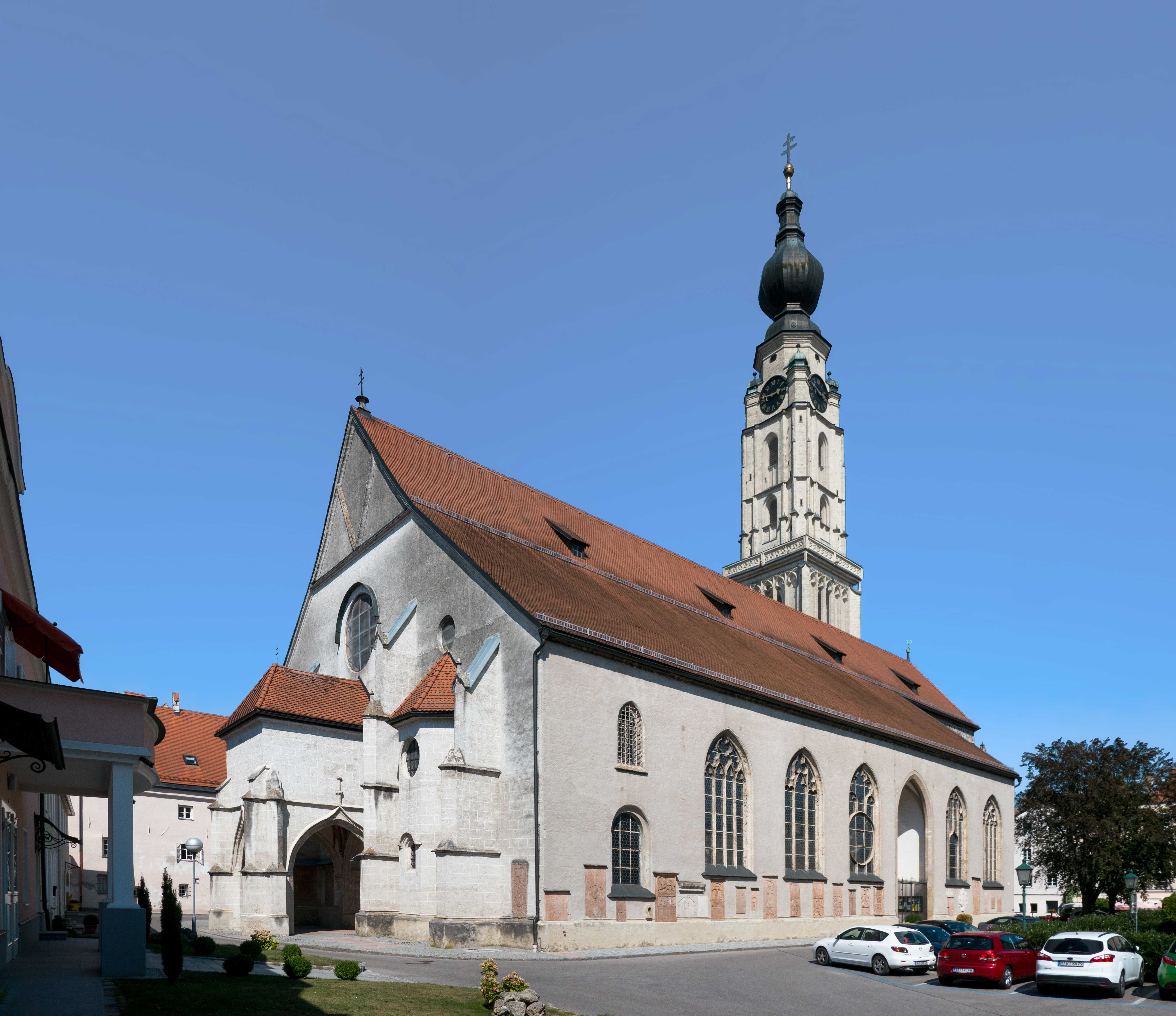 Stadtpfarrkirche hl. Stephanus